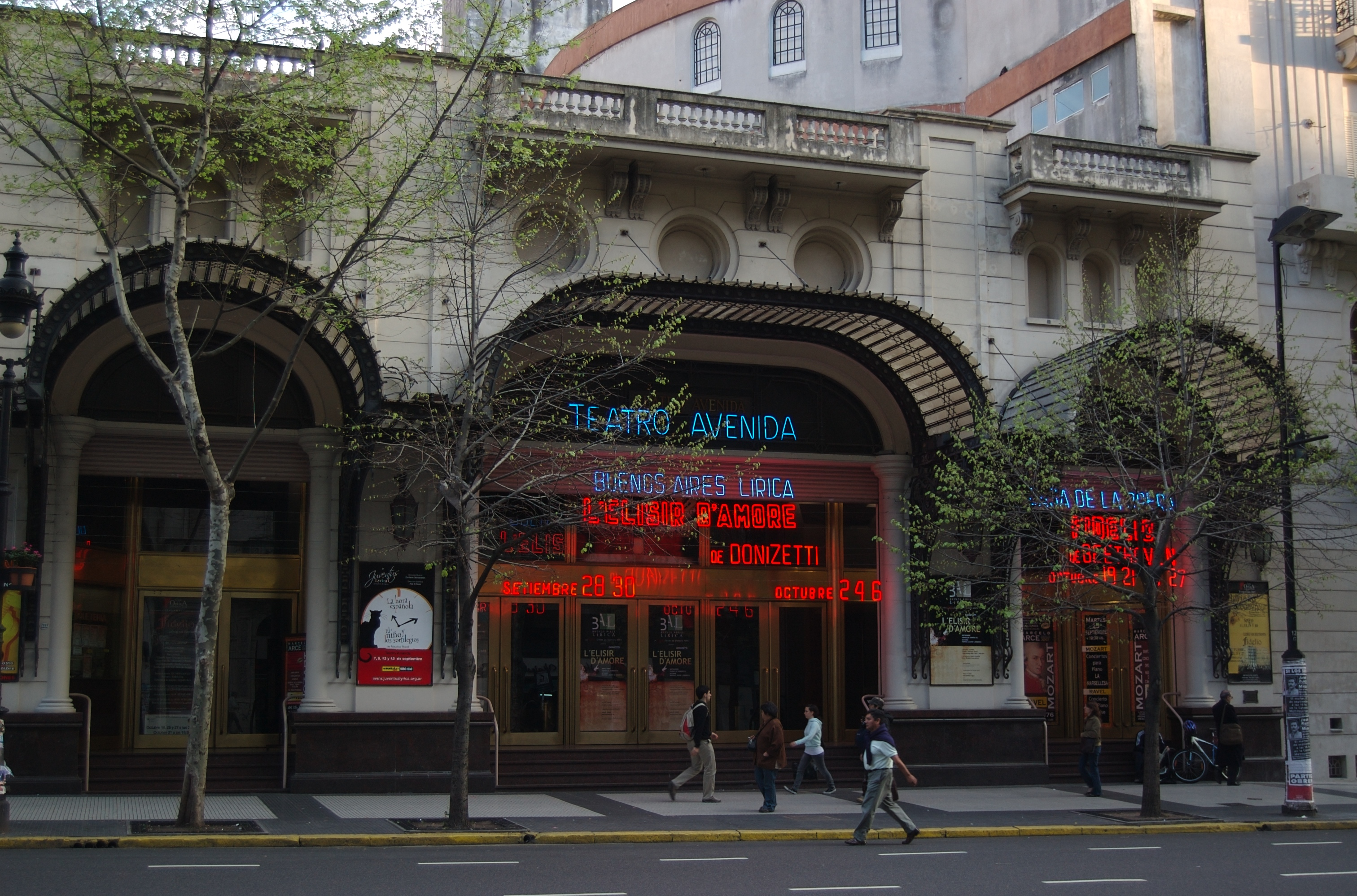 Teatro Avenida, Avenida de Mayo, Buenos Aires, Argentina.